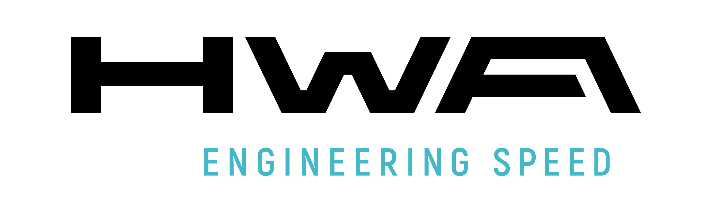 tirado para a empresa